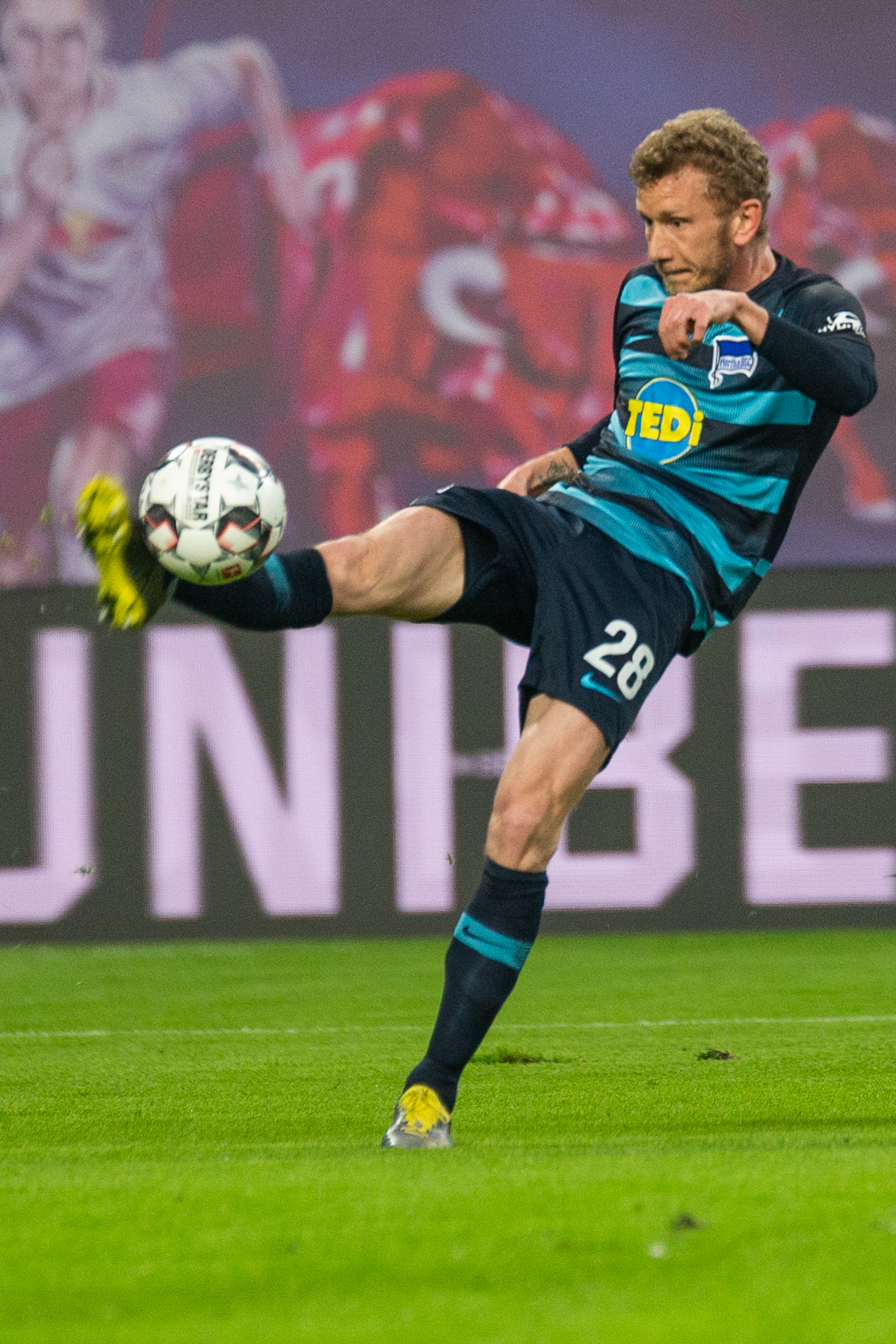 Fußball, Männer, 1. Bundesliga, RB Leipzig - Hertha BSC; Fabian Lustenberger (Hertha BSC, 28)